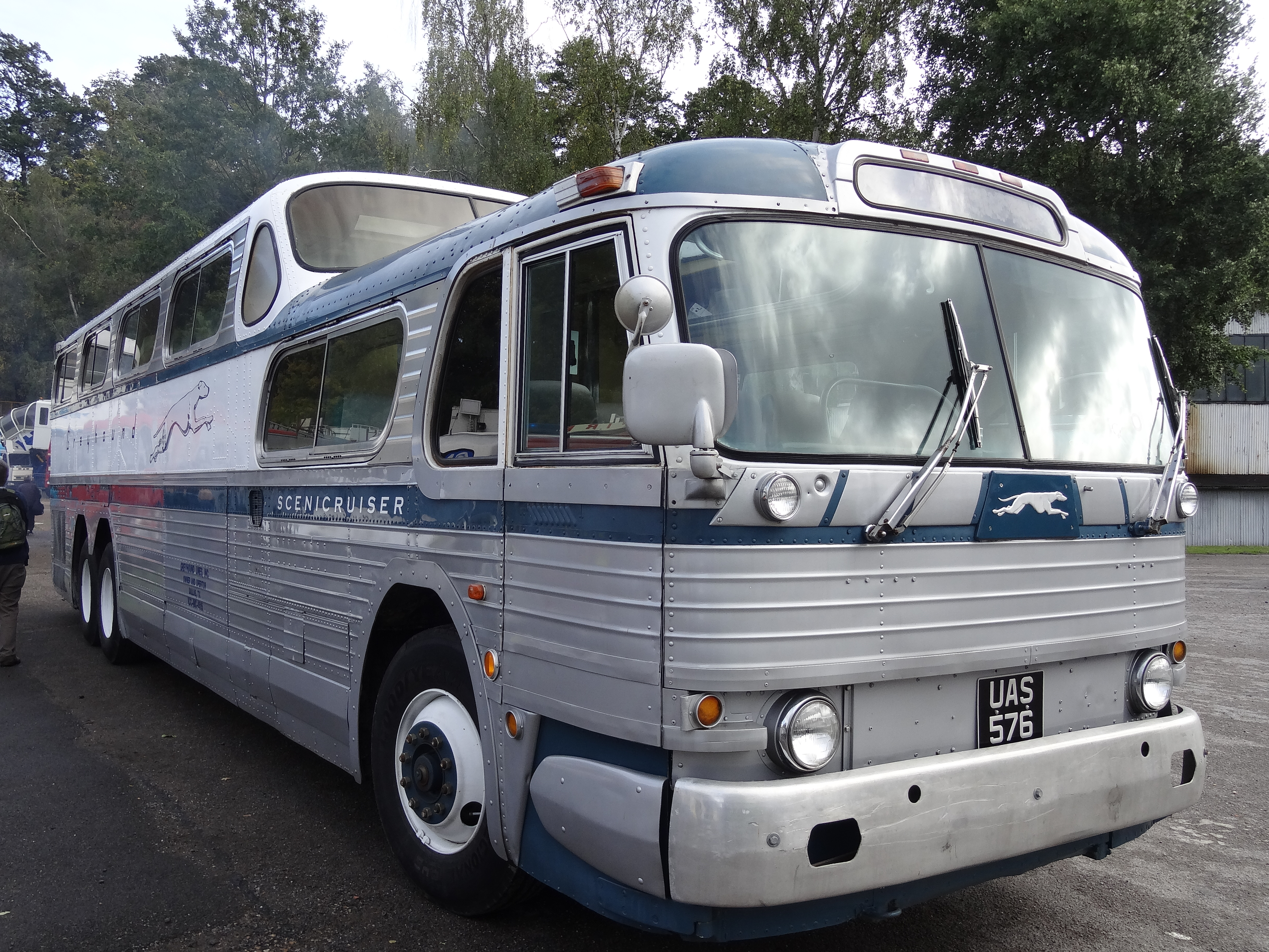 London Bus Museum Transportfest 2013 022